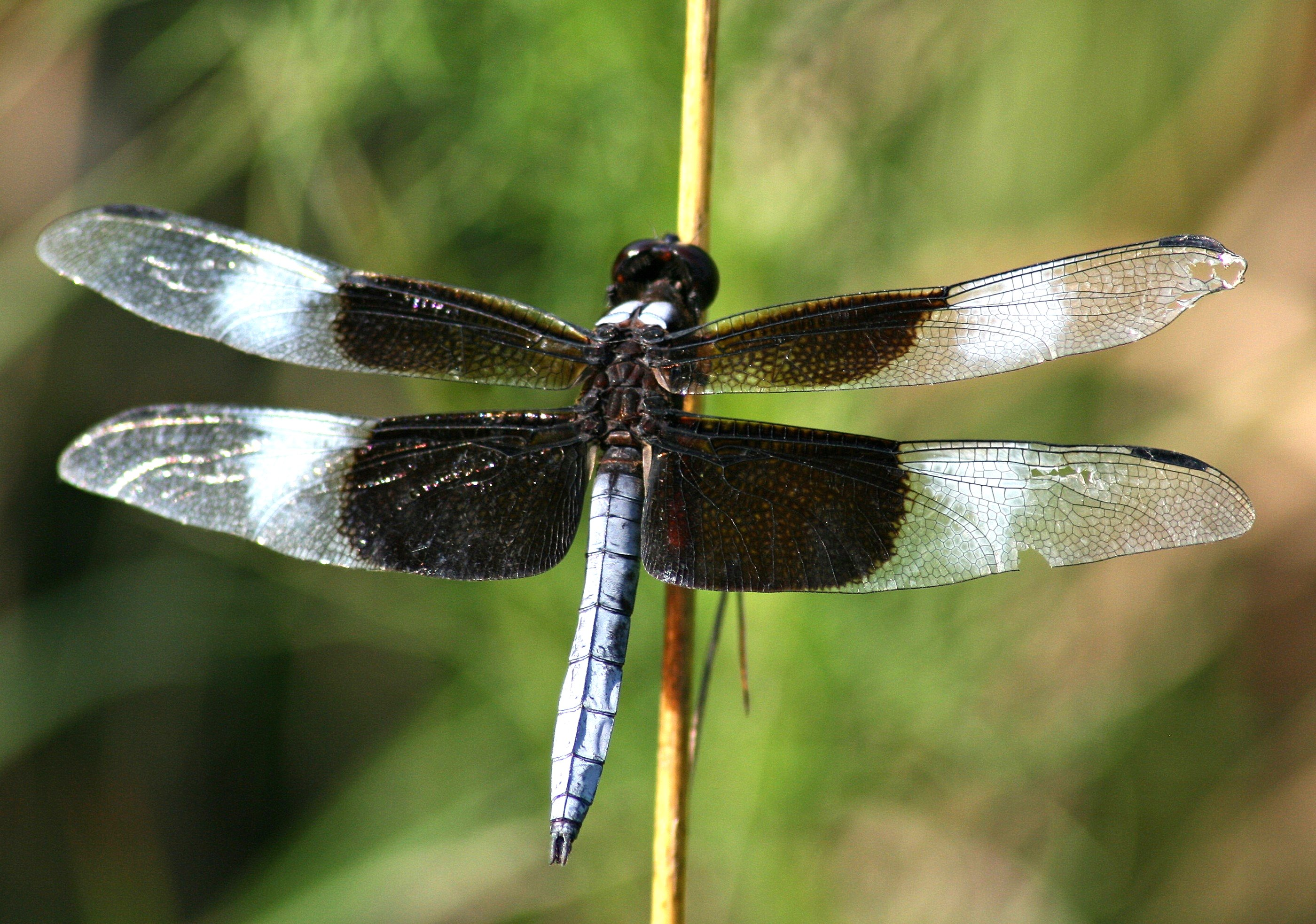 Widow Skimmer